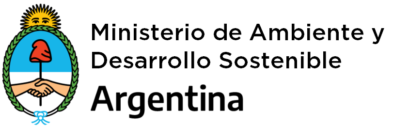 Ministerio de Ambiente